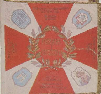 Sztandar 51 Pułku Piechoty Strzelców Kresowych im. Giuseppe Garibaldiego (strona lewa)